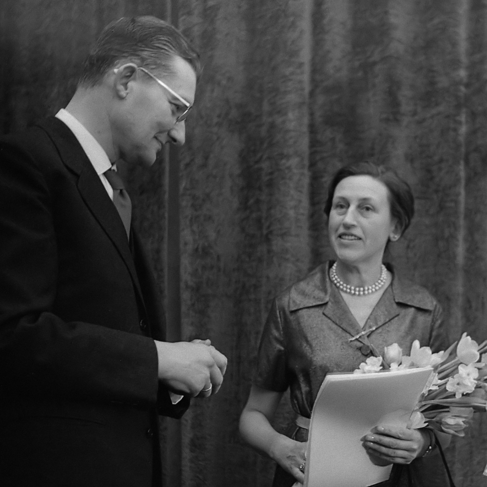 Uitreiking van de M. Nijhoffprijs in Den Haag door het Prins Bernhardfonds , v.l.n.r. voorzitter prof. mr. G. J. Wiarda , mej. Gerda van Woudenberg 26 januari 1961